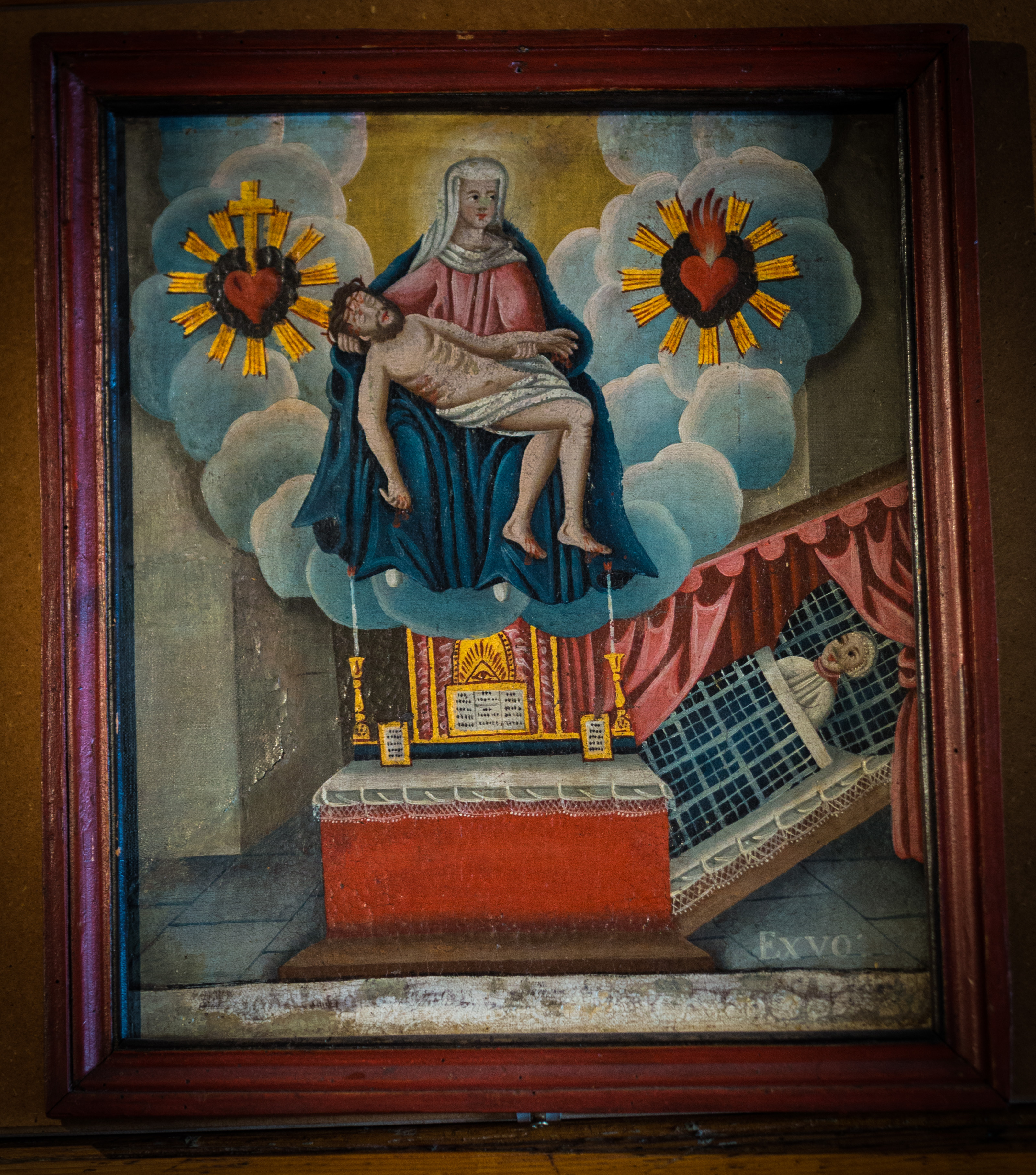 Ex voto pour une femme malade, Maennolsheim, début XIXe siècle, Musée alsacien, Strasbourg